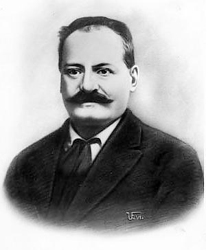 Alessandro Mussolini, padre di Benito Mussolini.